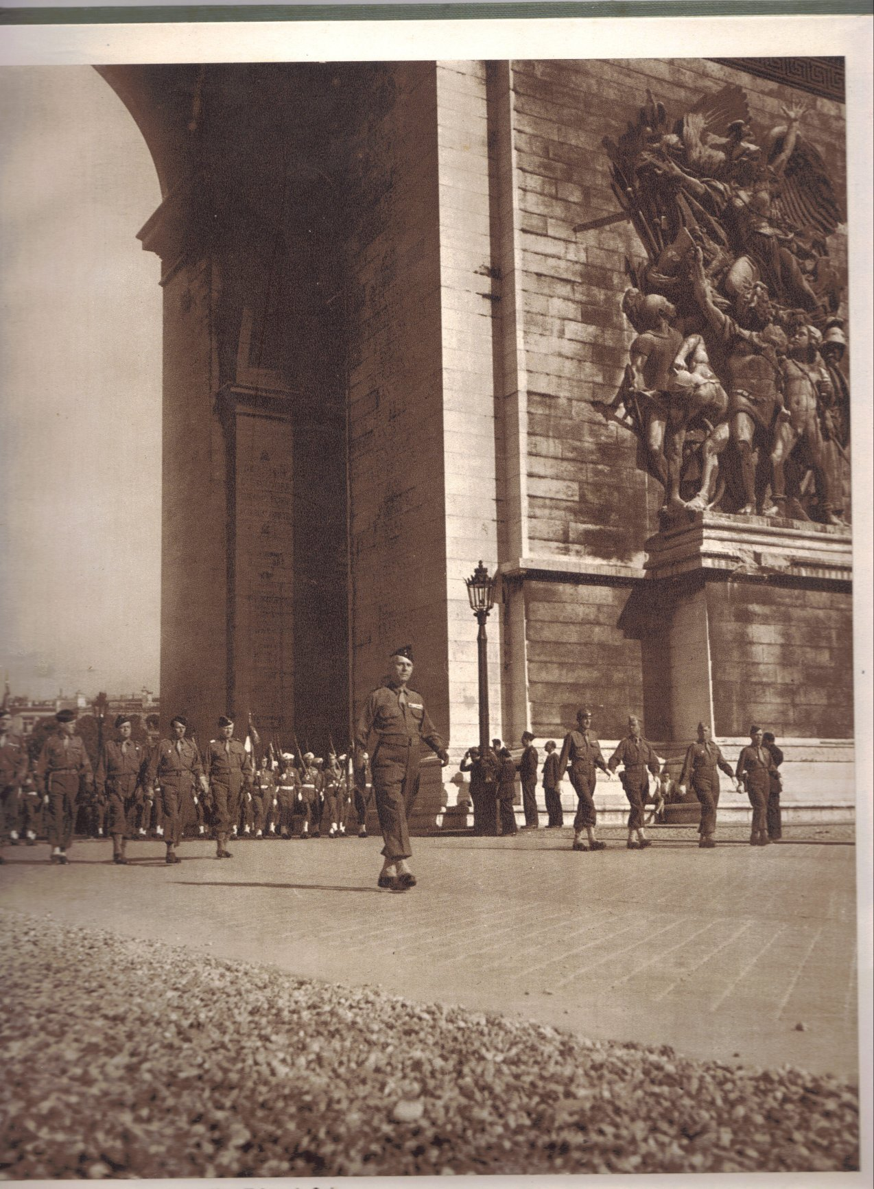 Défilé du 18 juin 1945 à Paris. La 14ième D.I. défile derrière le général Salan. A droite des chefs de corps, le colonel Pierre Elie Jacquot.